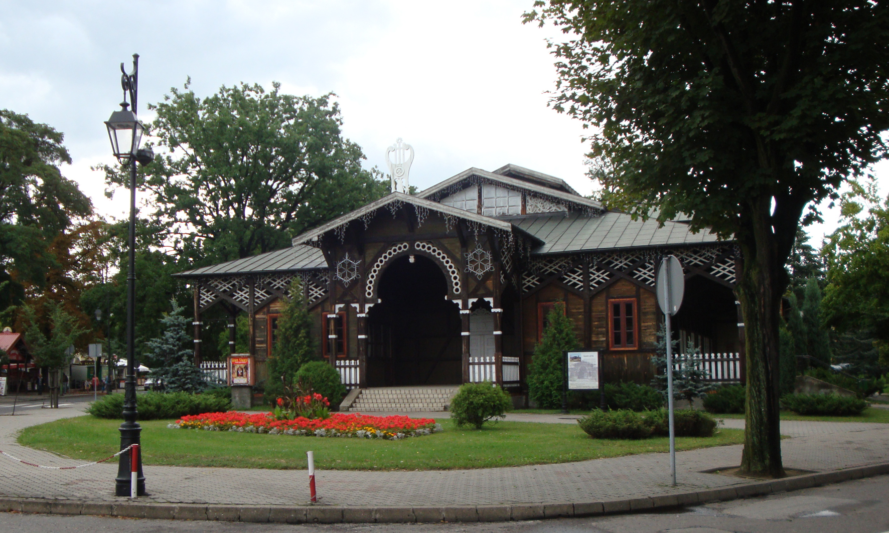 Ciechocinek, Teatr Letni, drewniany,1900-1902